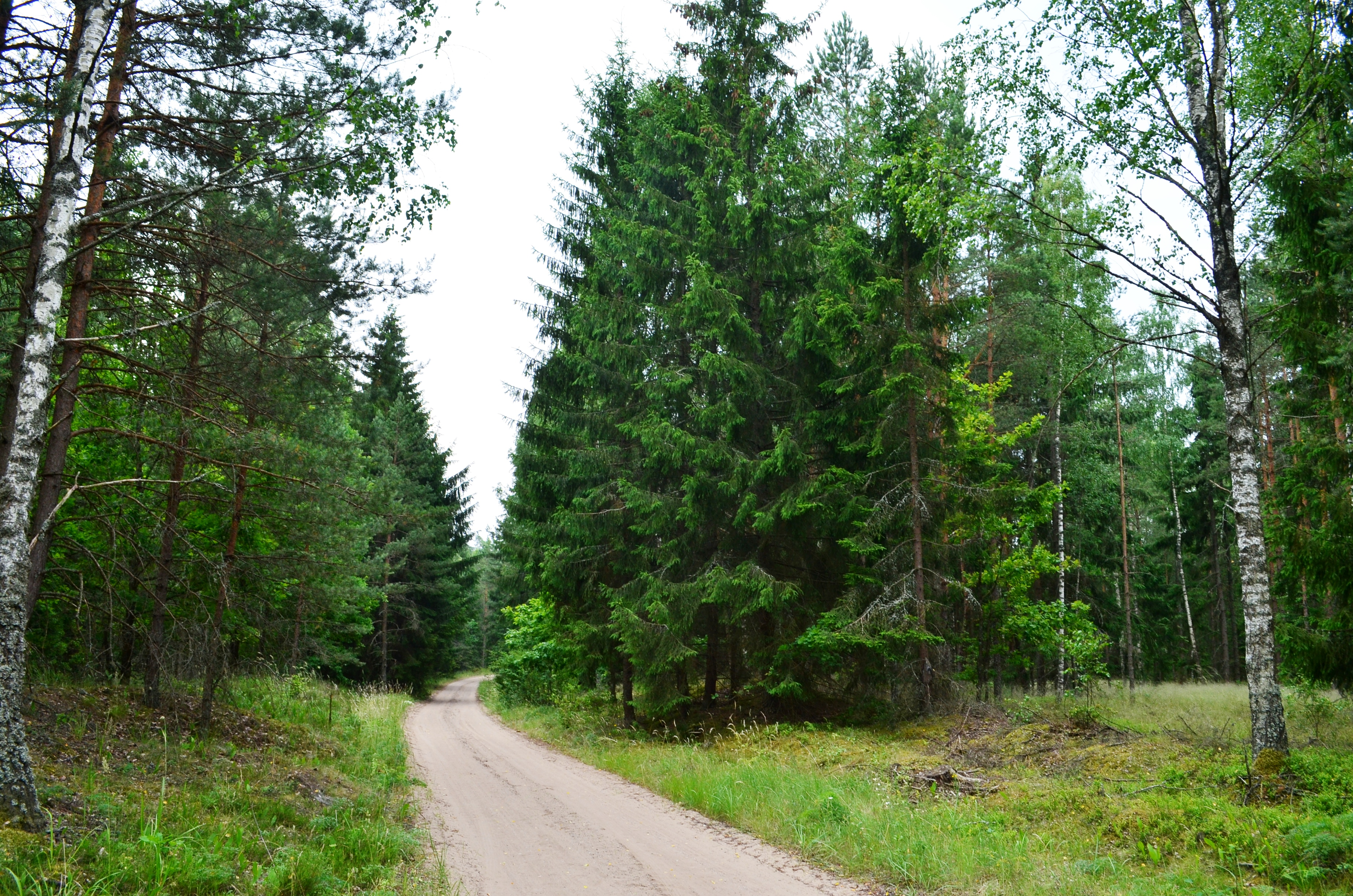 Viešvilės miškas (Karšuvos giria), į vakarus nuo Viešvilės, Jurbarko raj.